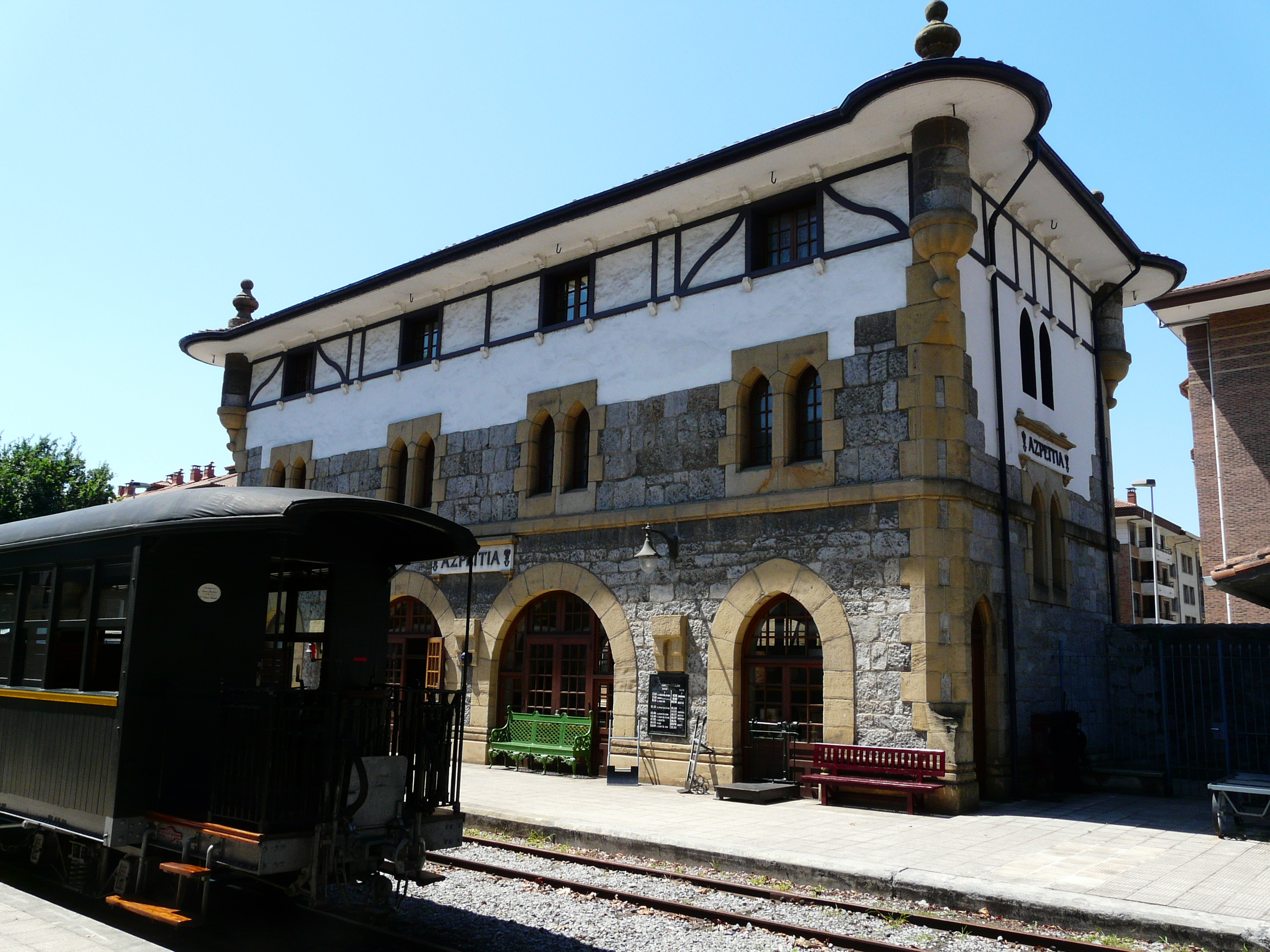 Trenbidearen Euskal Museoa (Museu Basc del Ferrocarril), a Azpeitia)